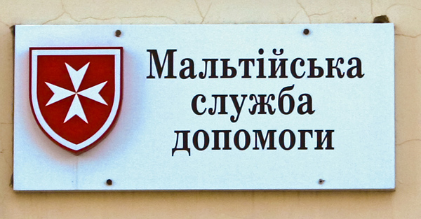 Desk. Malteser Lutsk.